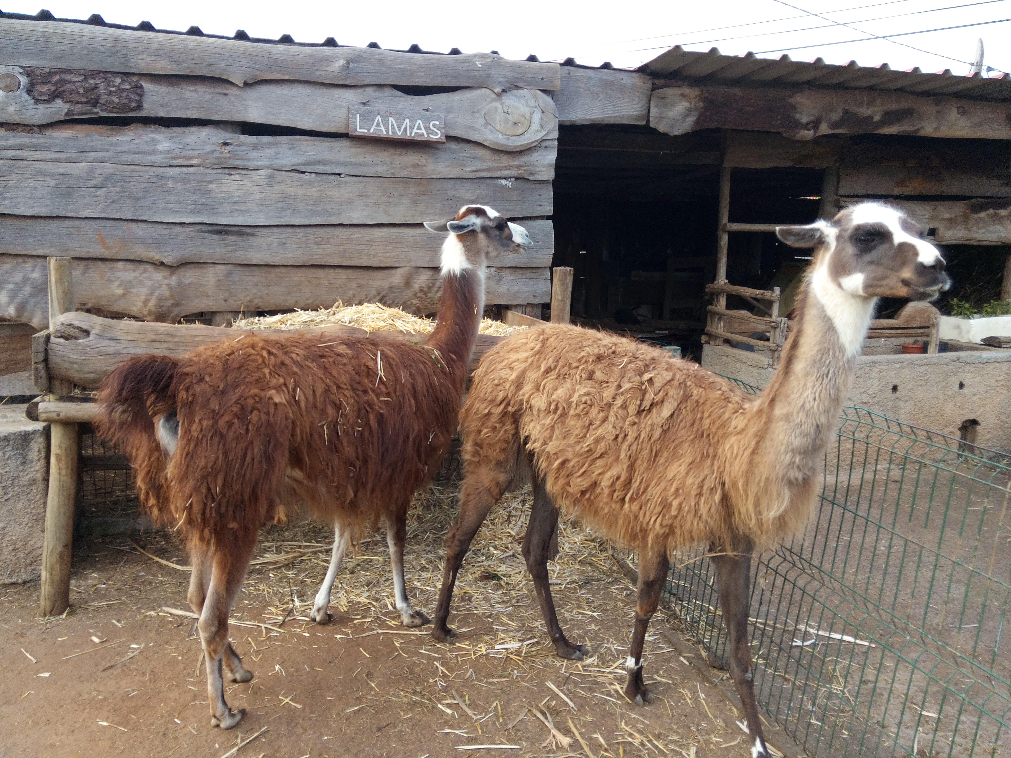 Quinta Pedagógica dos Prazeres, Calheta, ilha da Madeira